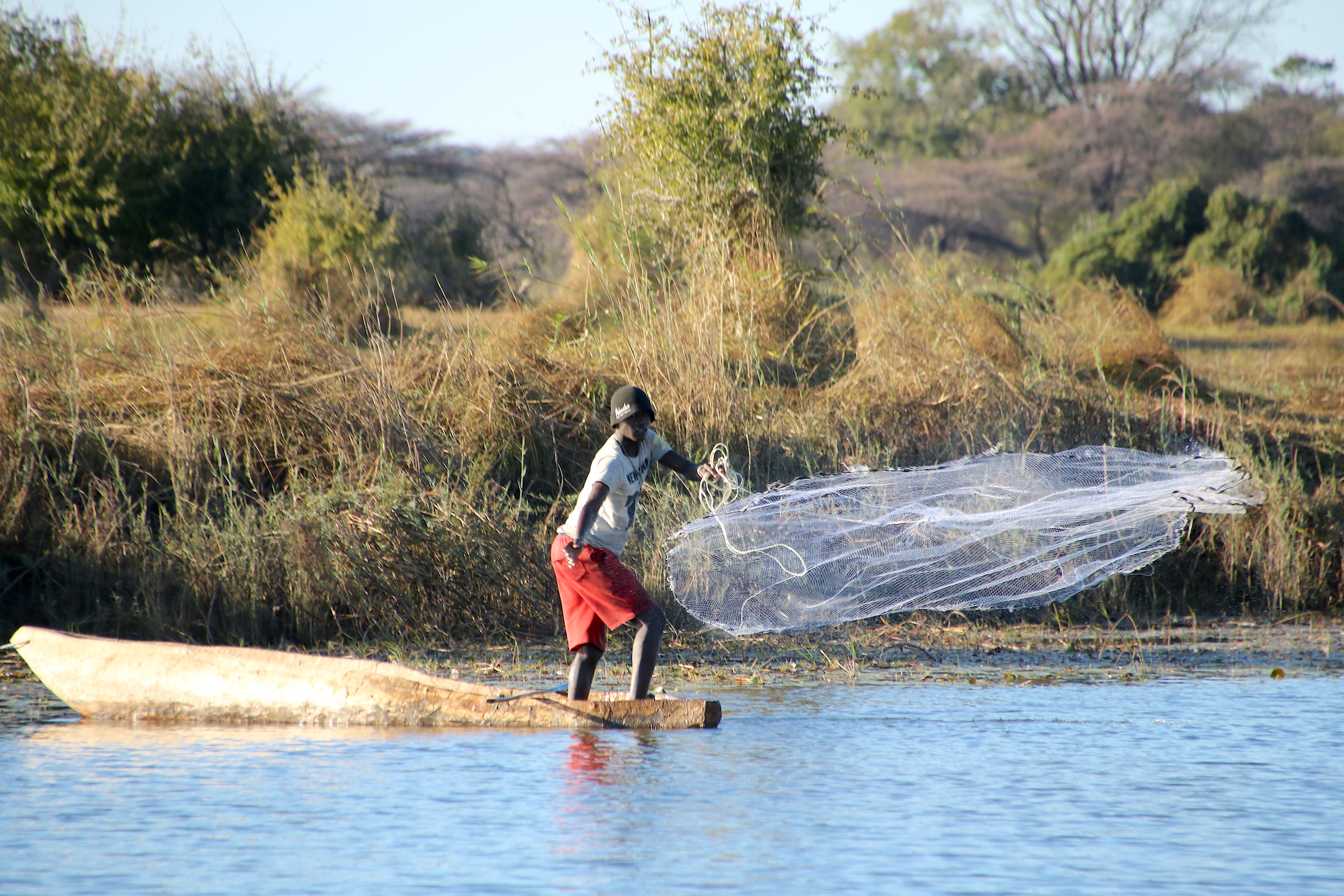 Fischer am Okavango bei Rundu (2018)